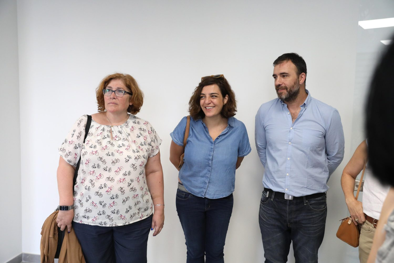 El delegado de Coordinación Territorial y Cooperación Público-Social, Nacho Murgui, ha visitado hoy, 7 de julio, una de las actuaciones que se están llevando a cabo a través del Fondo de Reequilibrio Territorial (FRT). Se trata de la rehabilitación del antiguo CEIP Rubén Darío que se destinará en el futuro a albergar el Espacio de Igualdad de Hortaleza.